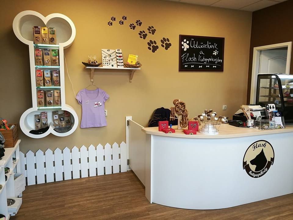 Kutyapékség üzlete, Budán.